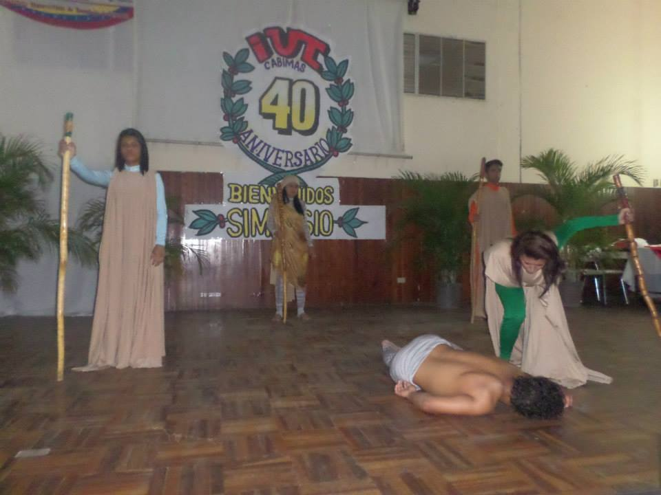 40 aniversario iutc